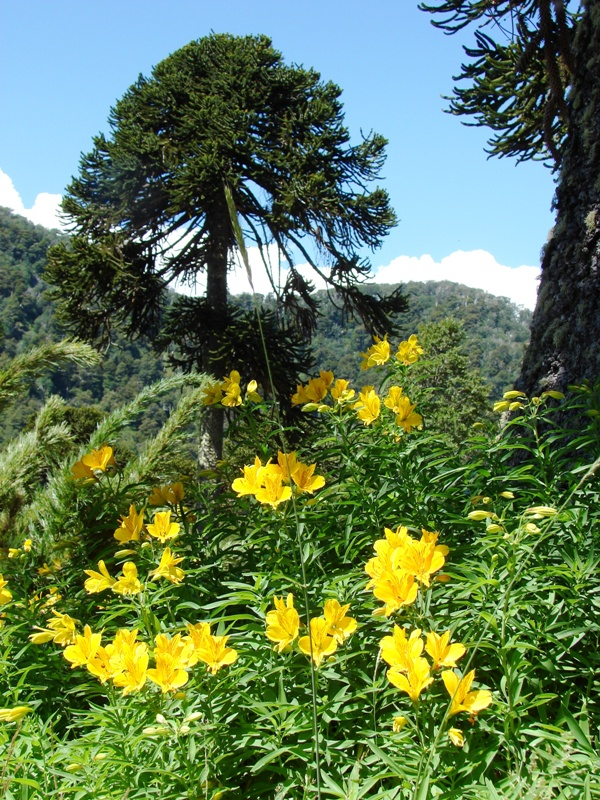 Araucaria araucana y Alstroemeria aurea PN Villarrica